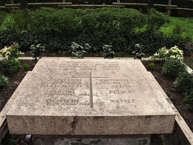 lapide contenente nom i di partigiani uccisi: Giovanni Bellandi, Ludovico Bertona, Aldo Fizzotti, Felice Zanoni, Natale Olivieri